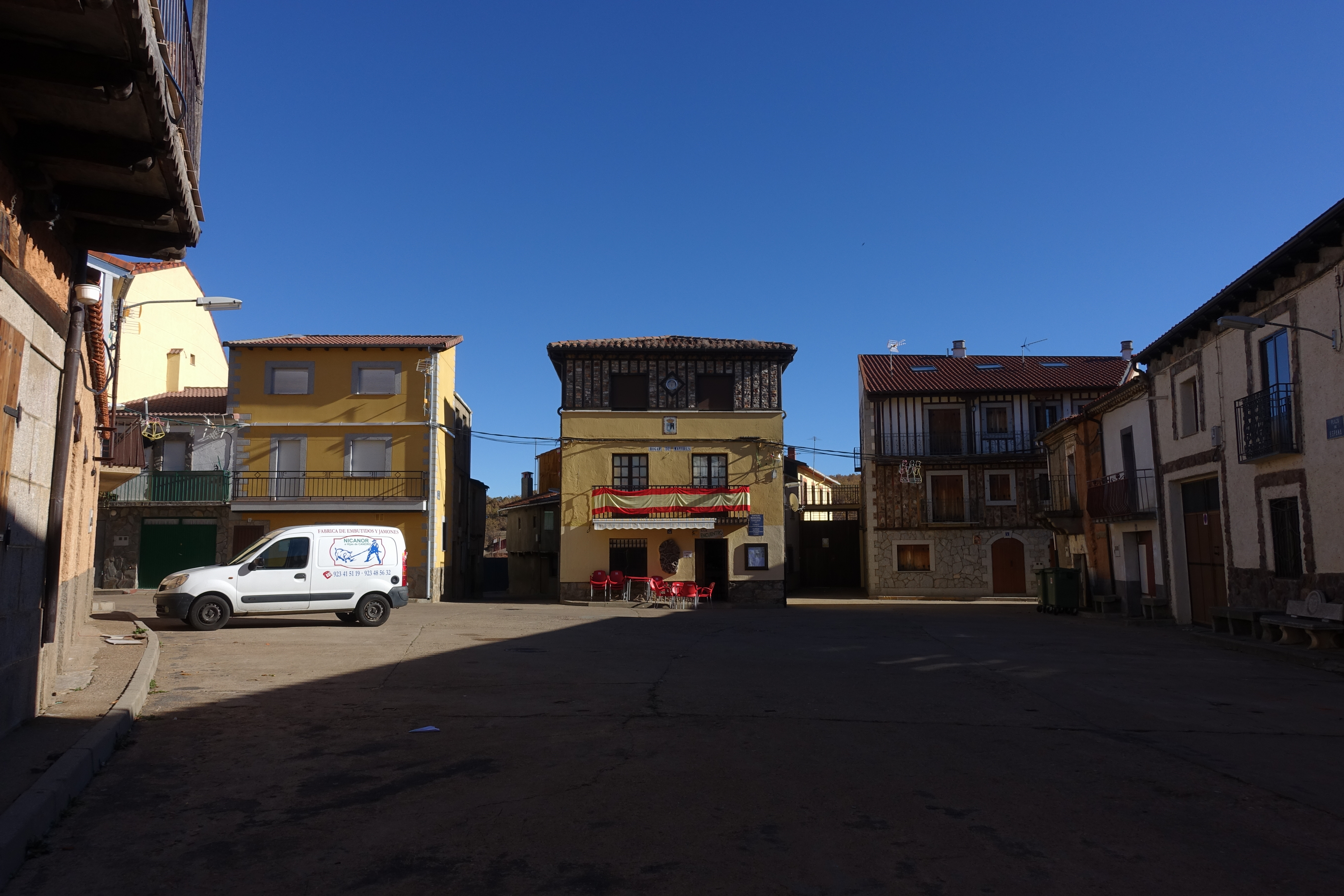 Plaza de España, en El Maíllo (Salamanca, España).